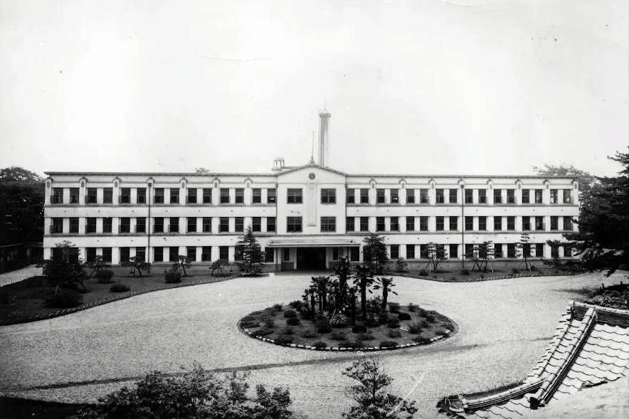 明治大学和泉キャンパスの旧中央校舎